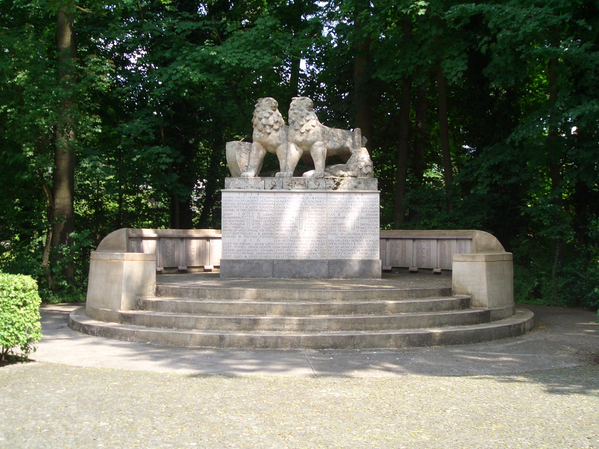 Ortszentrum, Kriegerdenkmal beim Rathaus, Juni 2005, selbst fotografiert, Fotograf: Jens Haessner, GNU-FDL